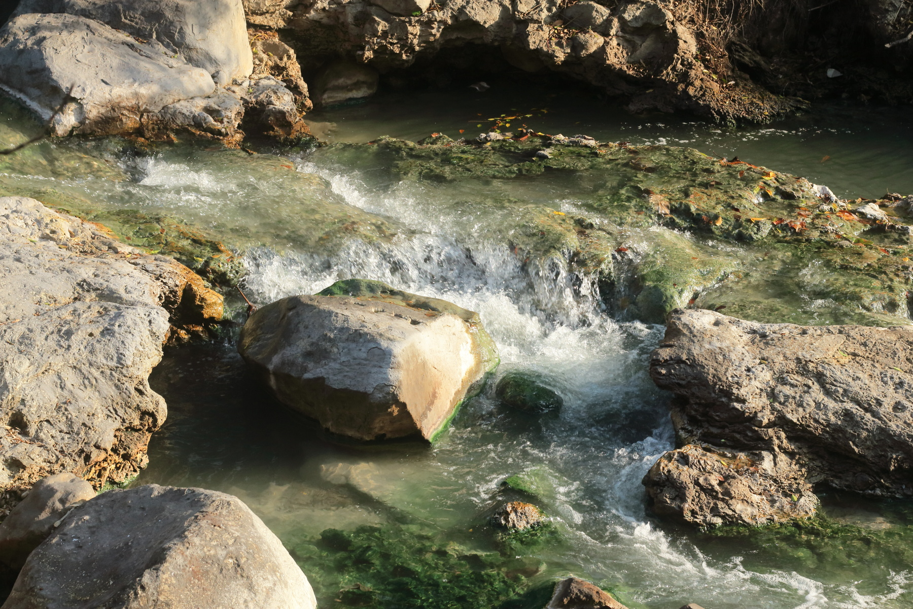 中文（台灣）: 北投溪上的岩石